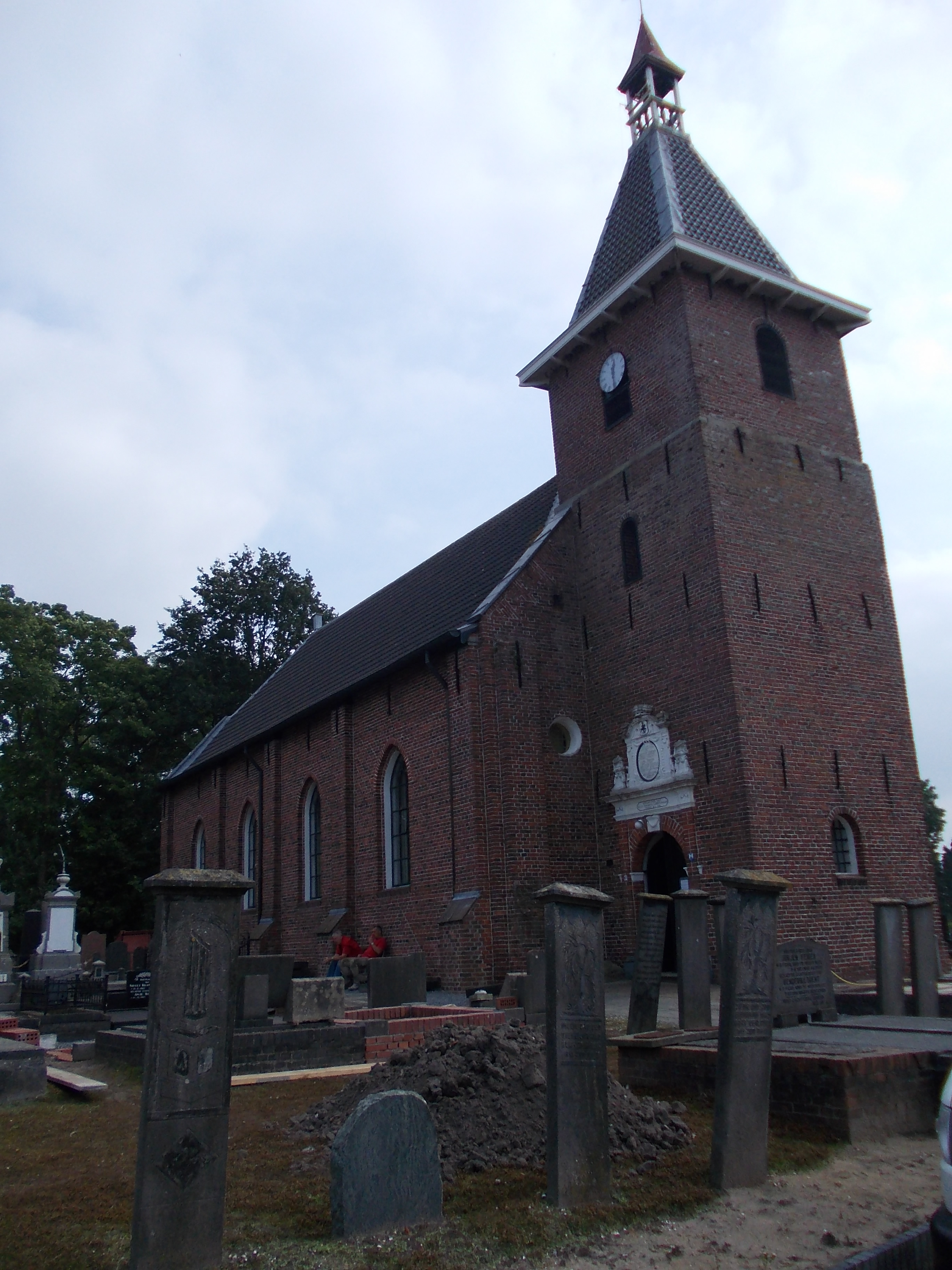 Hervormde kerk en toren